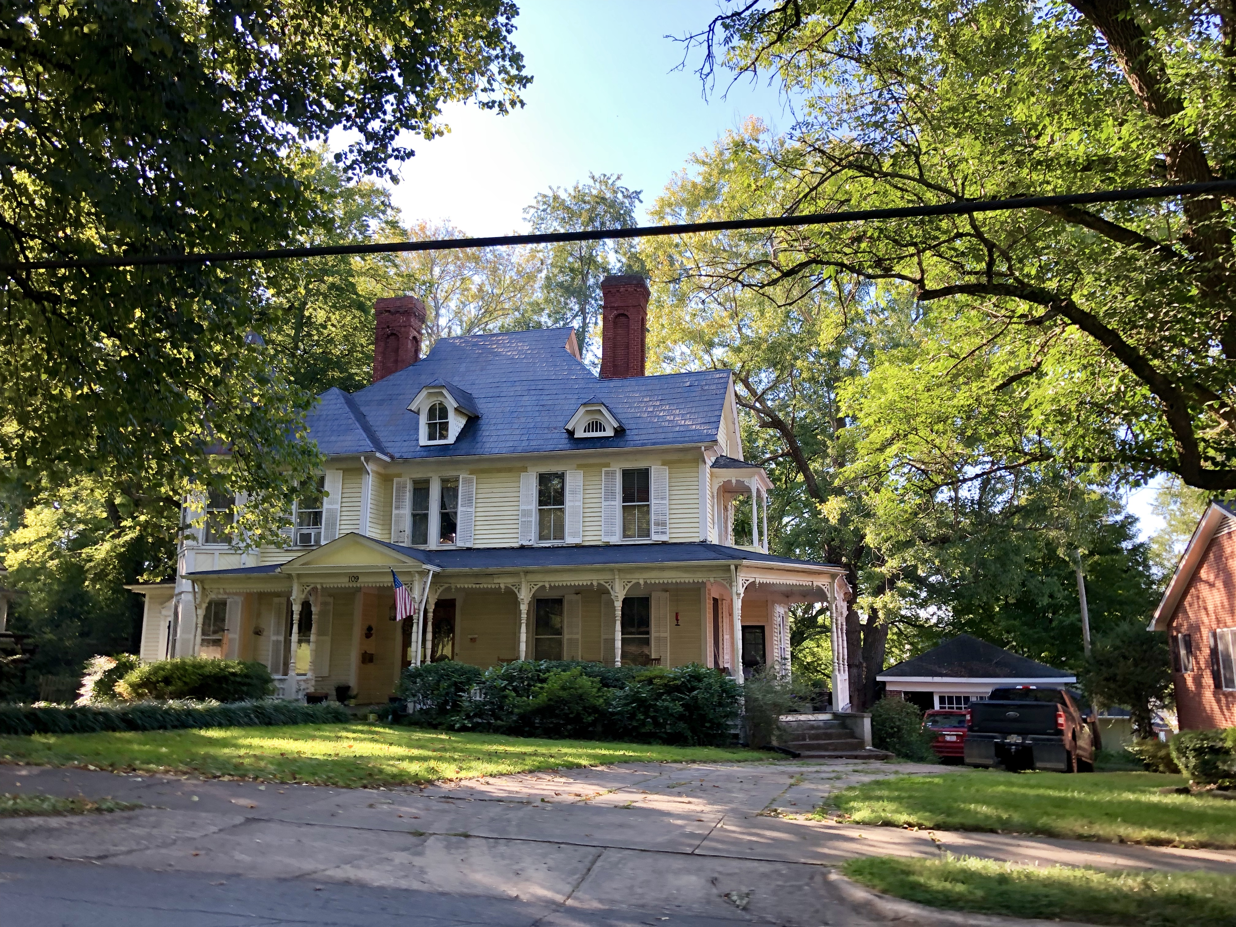 Valdese Avenue, Morganton, NC